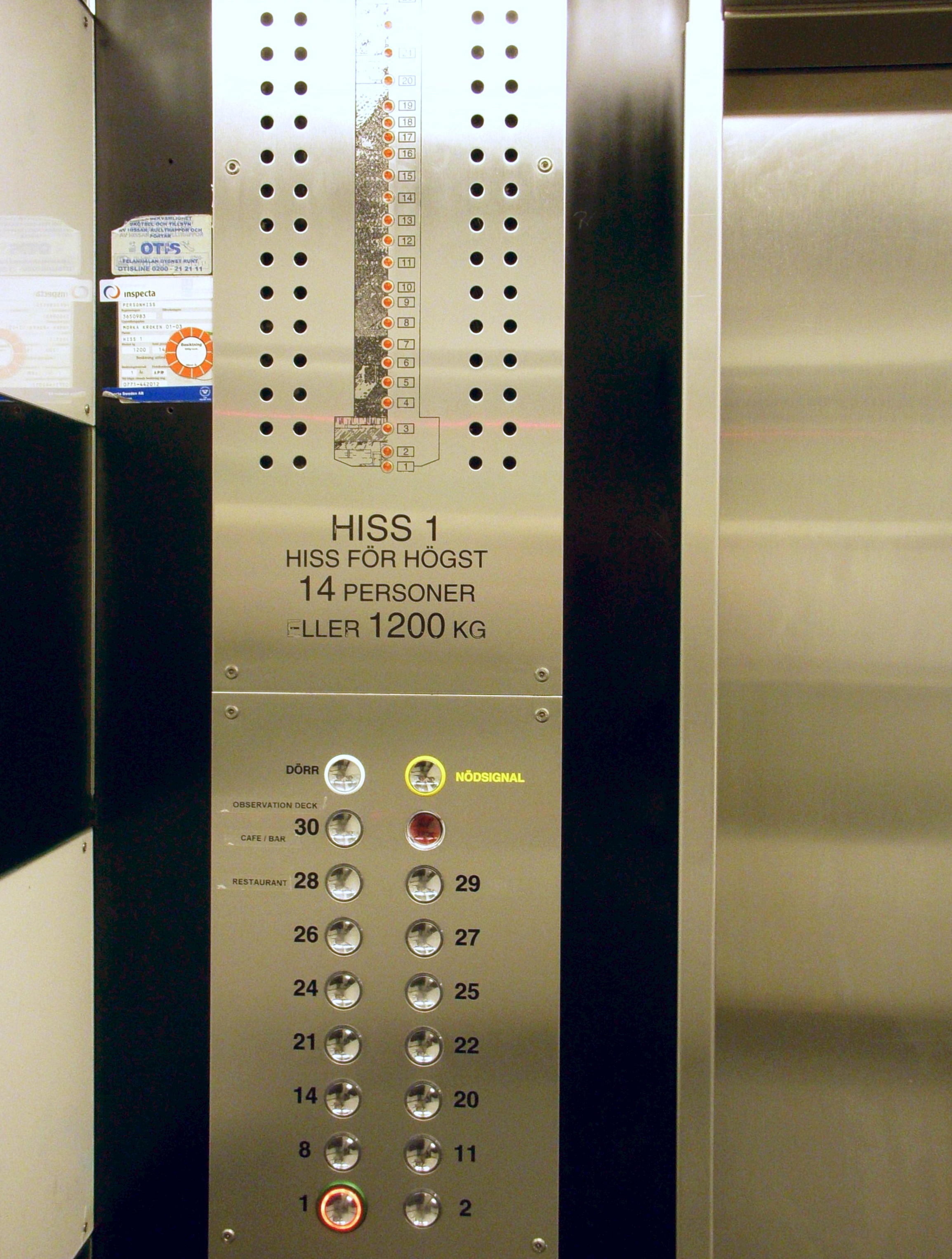 Kaknästornet i Stockholm, hissen